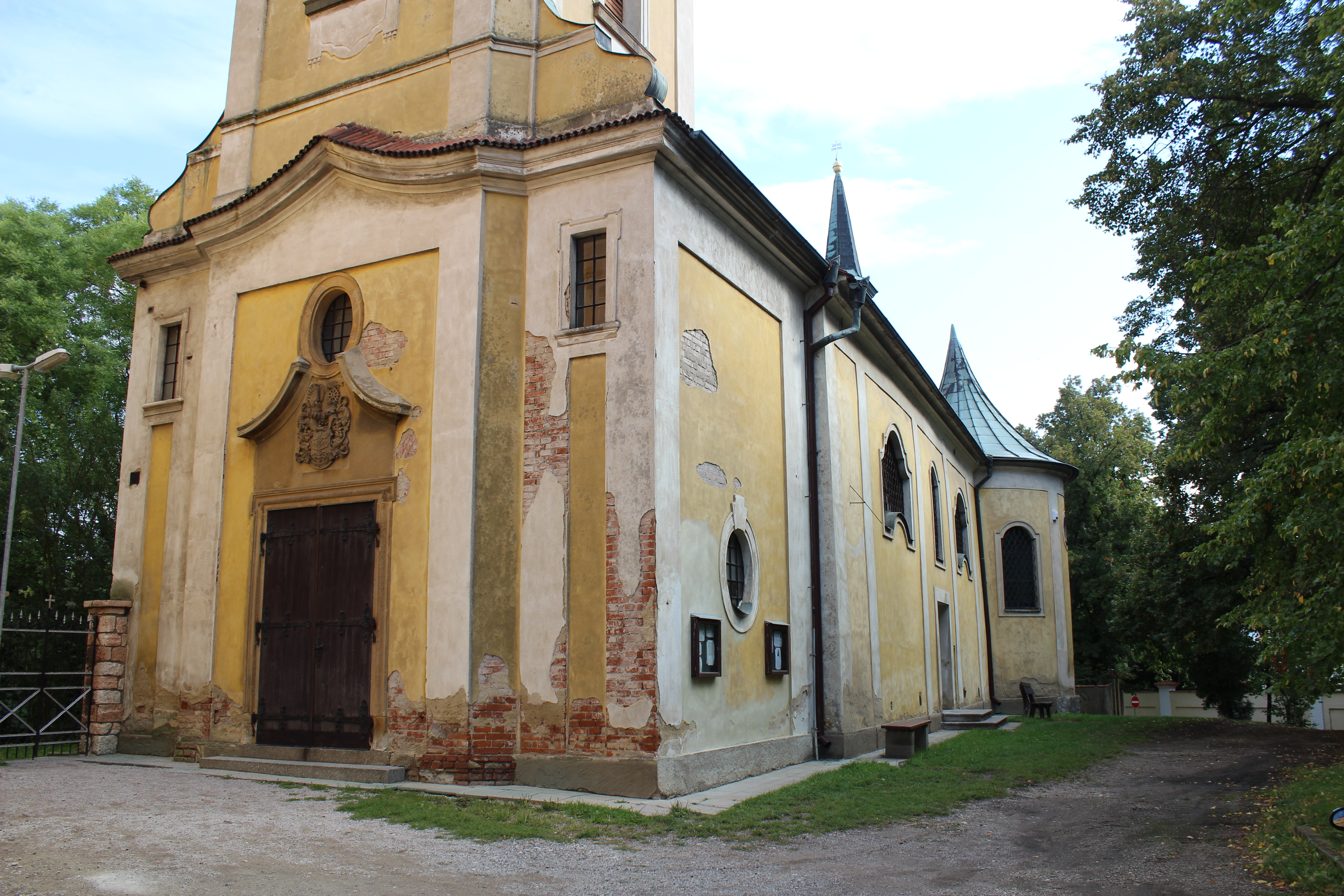 Kostel sv. Petra a Pavla v Litni